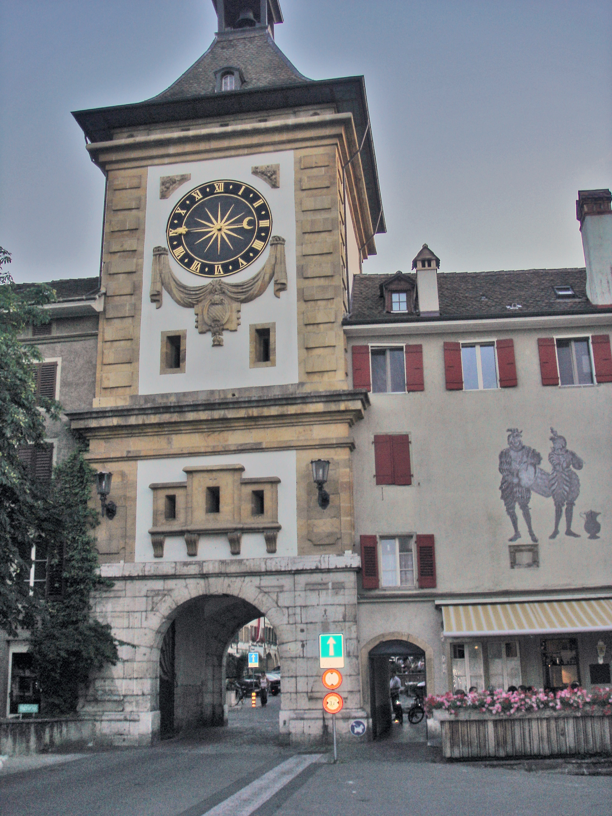 Einzeigerturmuhr an einem Stadttor; Murten/CH